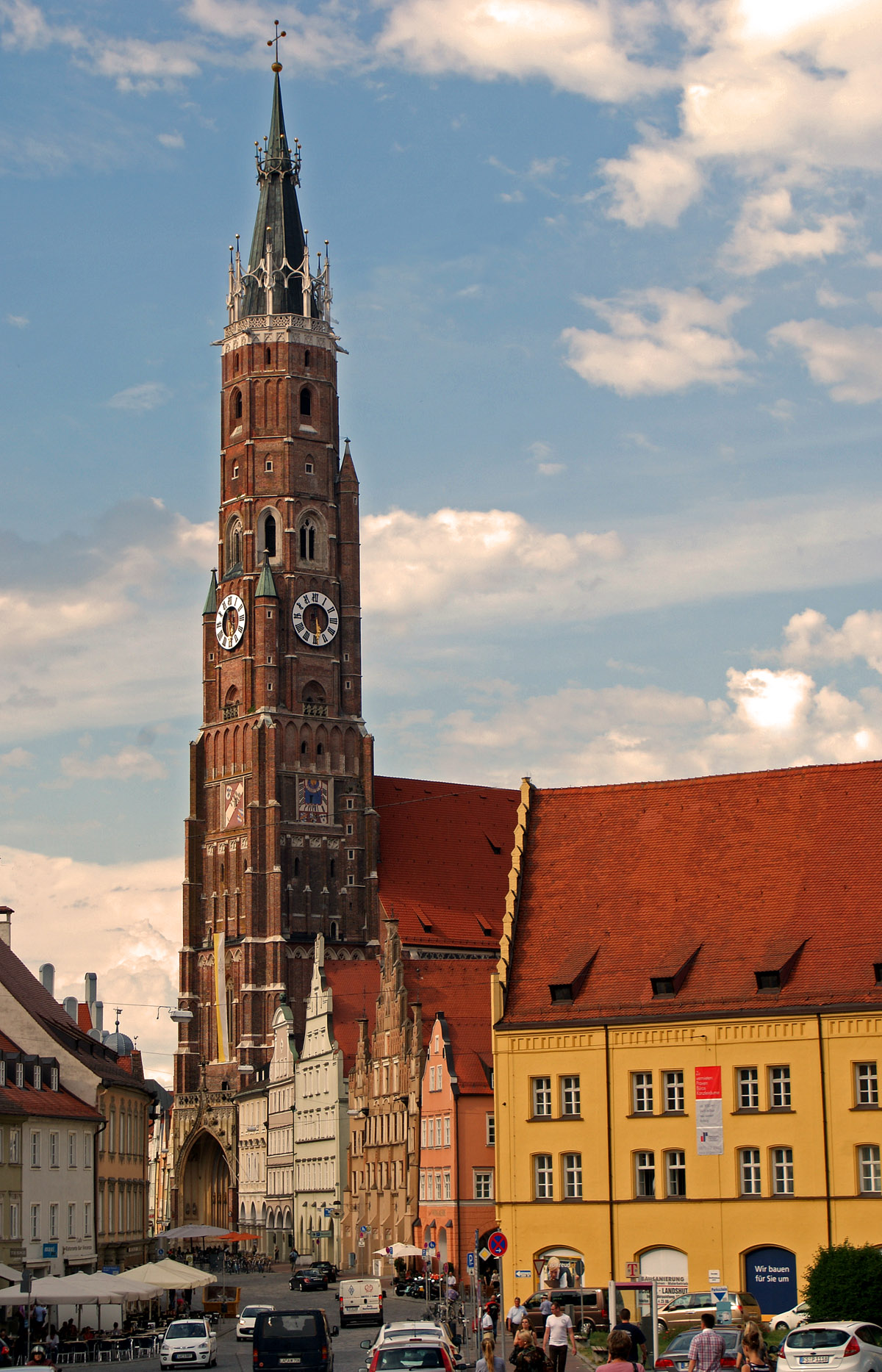 Turm der Martinskirche